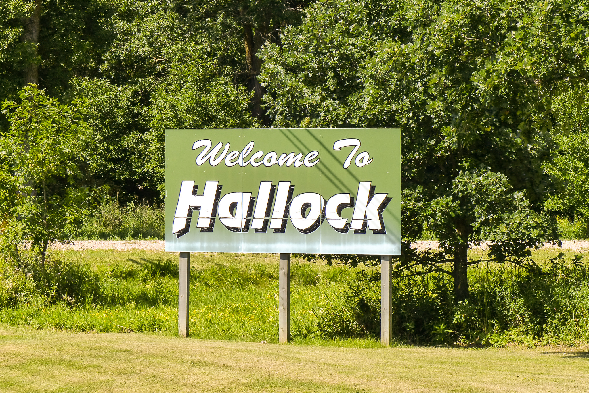 STNWM Hallock 1